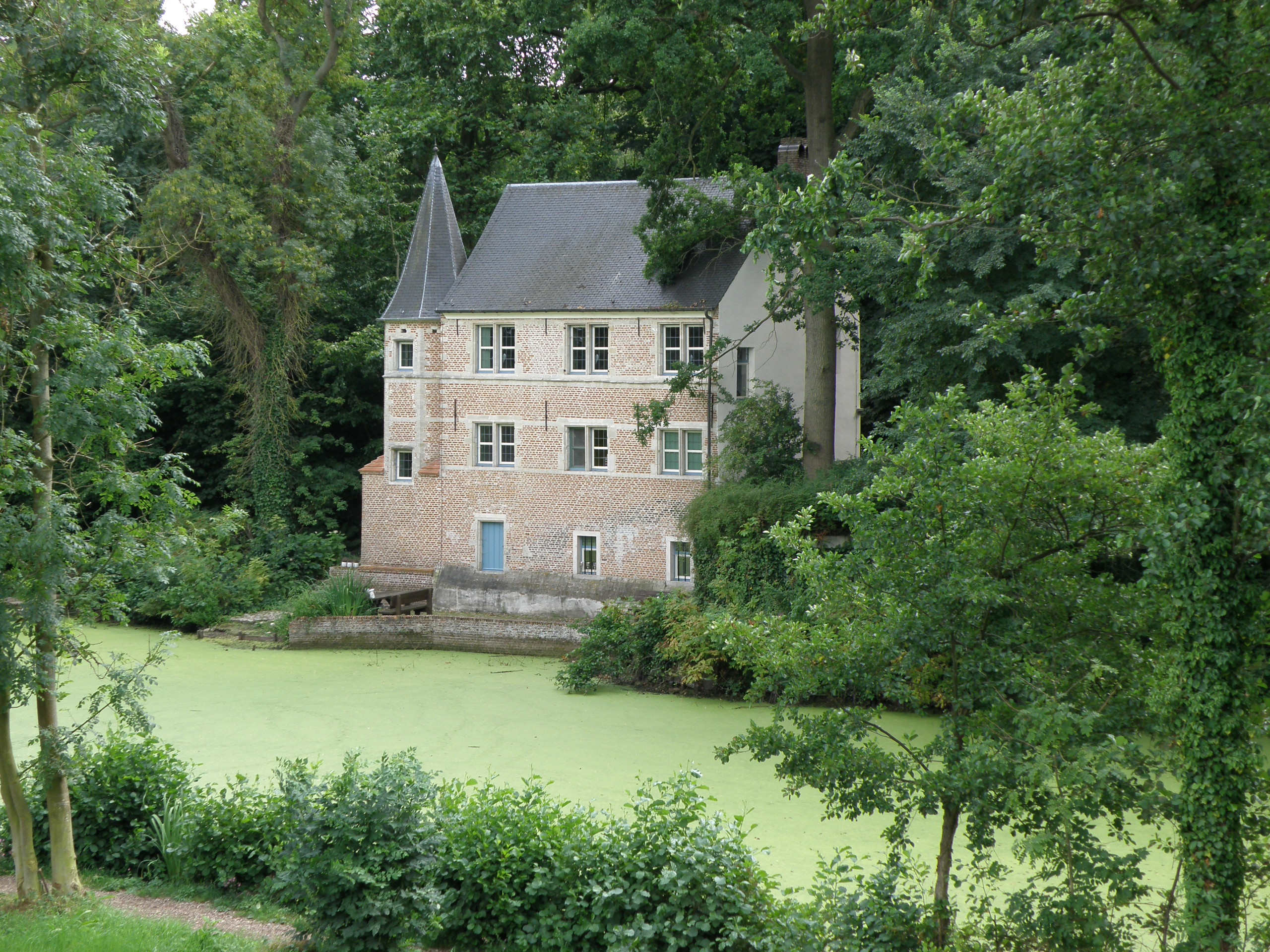 Sint-Katelijne-Waver (prov. Antwerpen, België). Abdij van Rozendaal (domein Roosendael), zgn. Pesthuis.